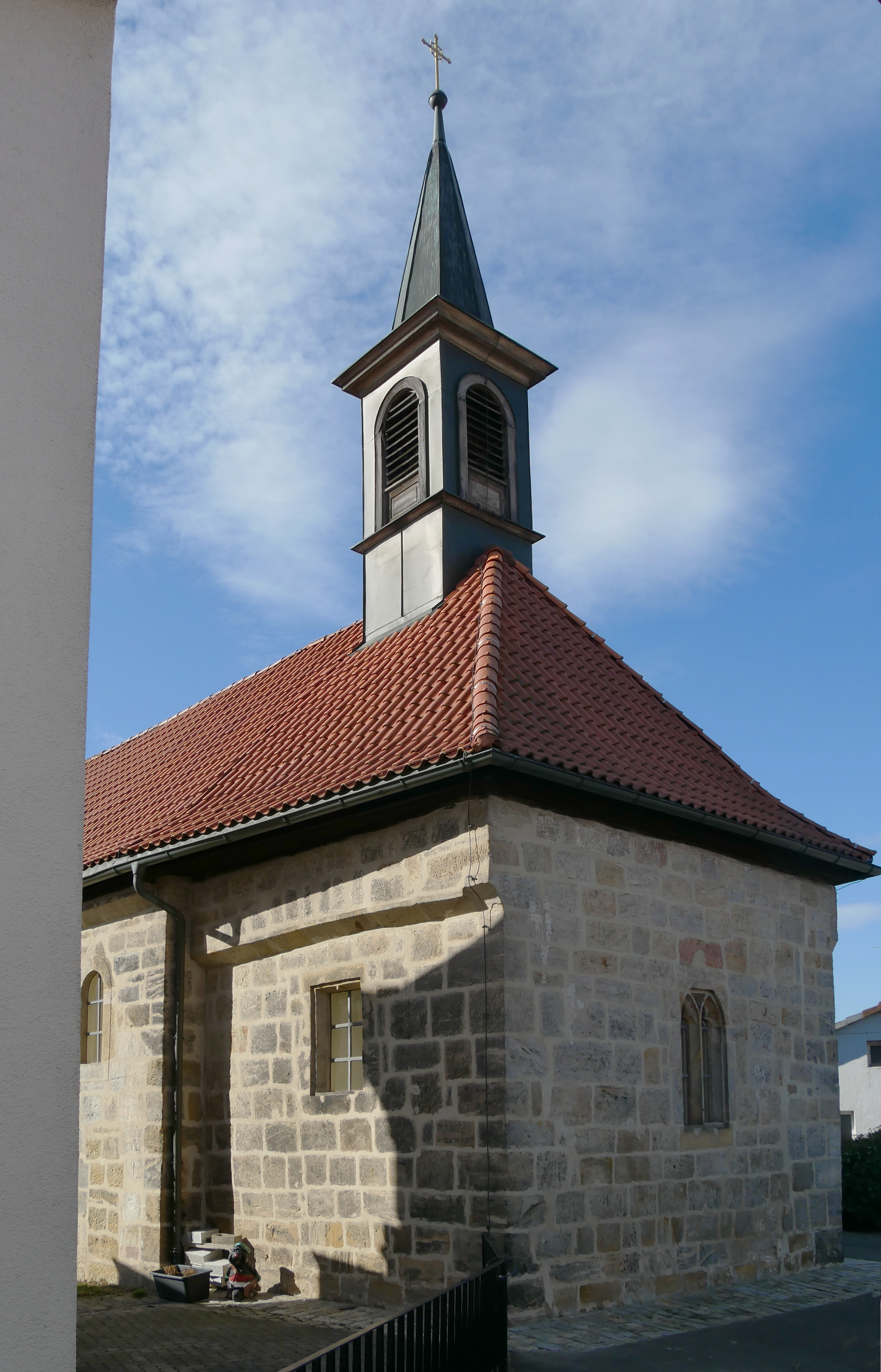 Lichtenfels, Kapellenberg2: Kapelle St. Jakob. Ansicht von Osten